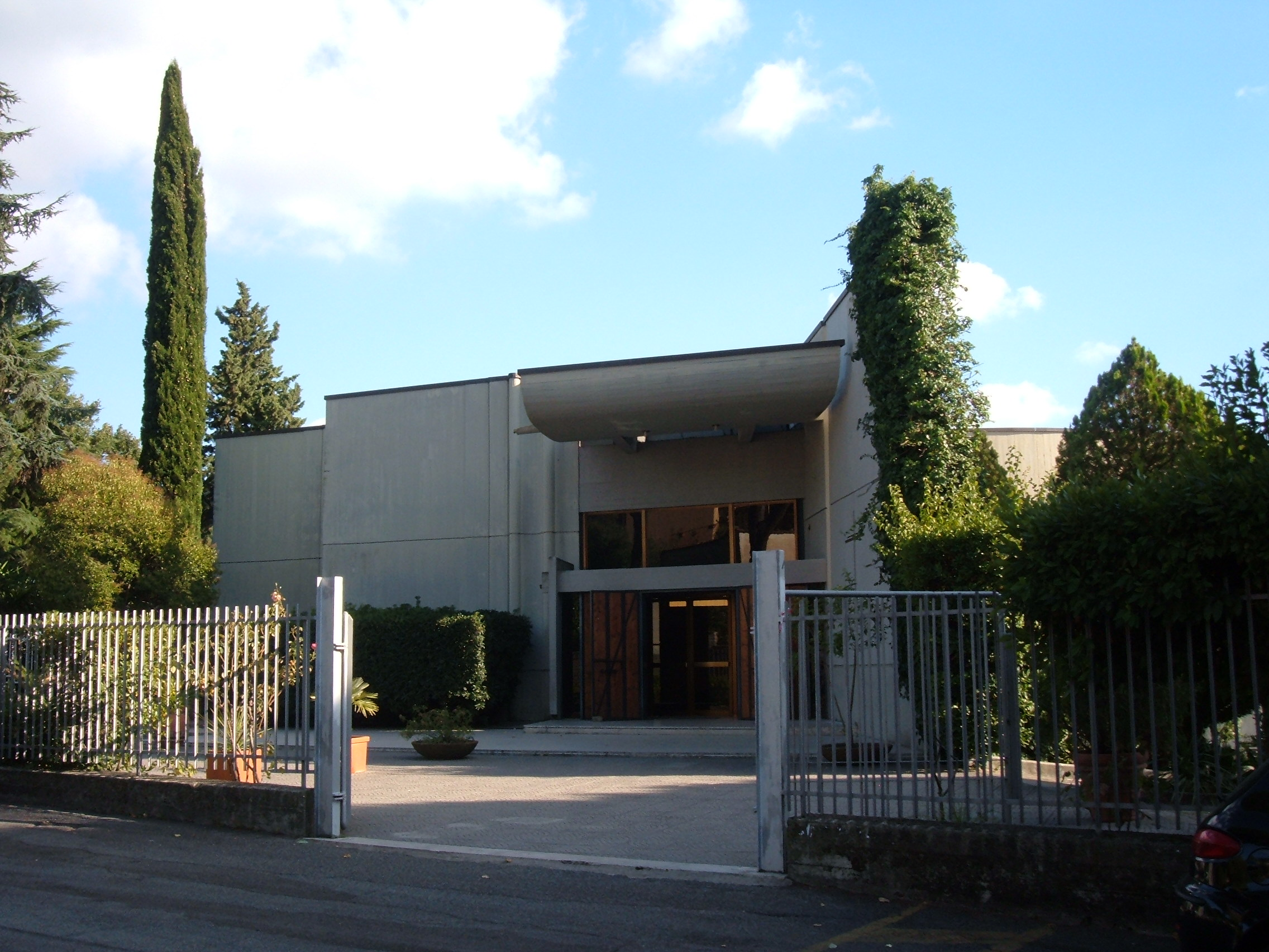 Chiesa di San Melchiade (papa Milziade), a Roma, in zona Labaro, in via Costantiniana.